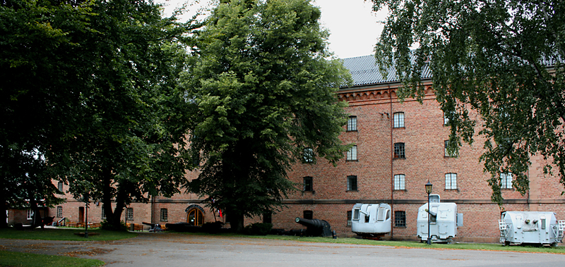 Marinemuseet, Karljohansvern, Horten.